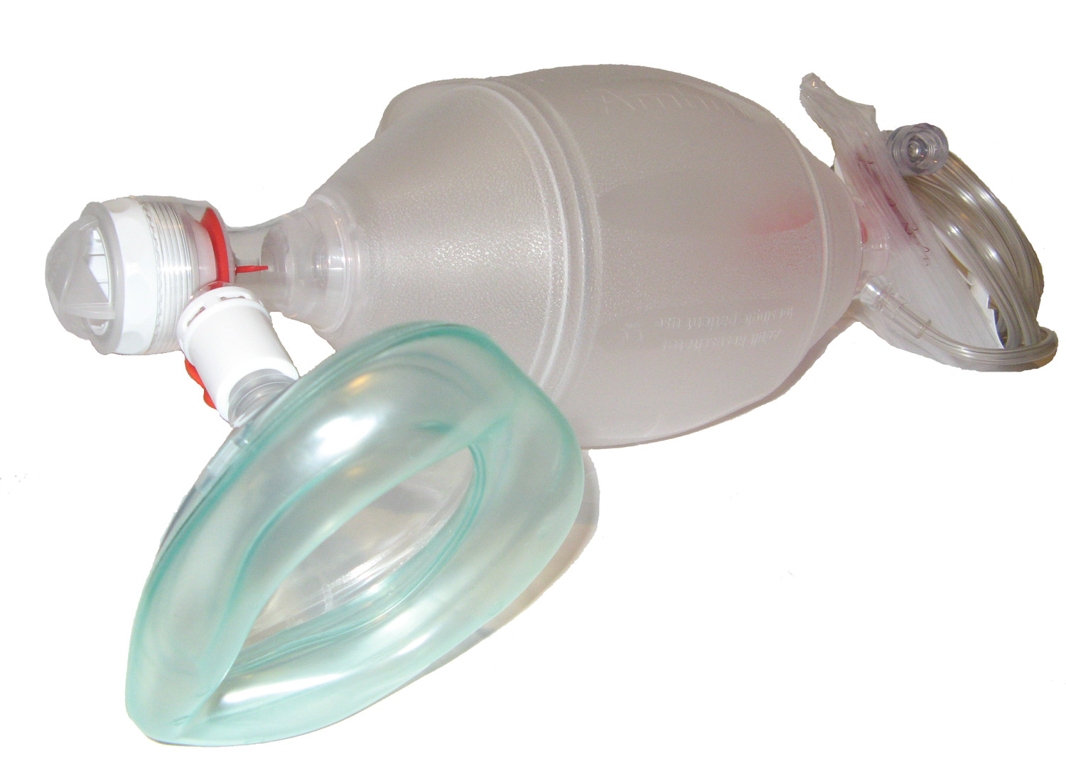 An Ambu Bag Valve Mask